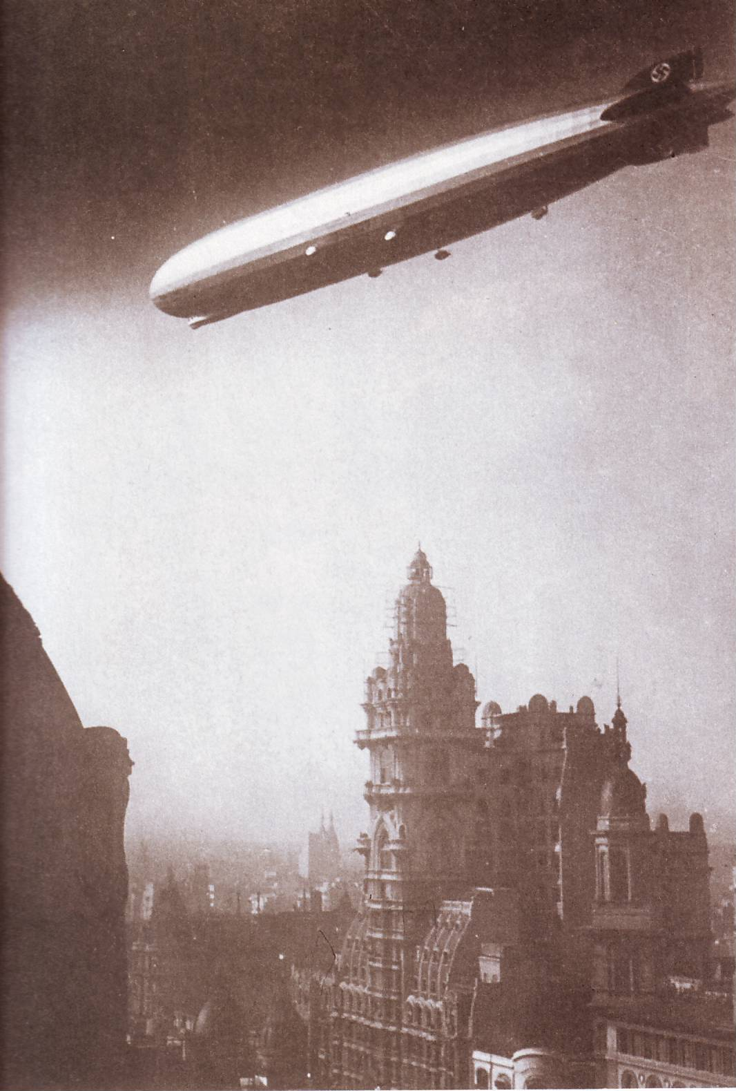 El Graf Zeppelin sobrevolando la Avenida de Mayo, en Buenos Aires, Argentina.